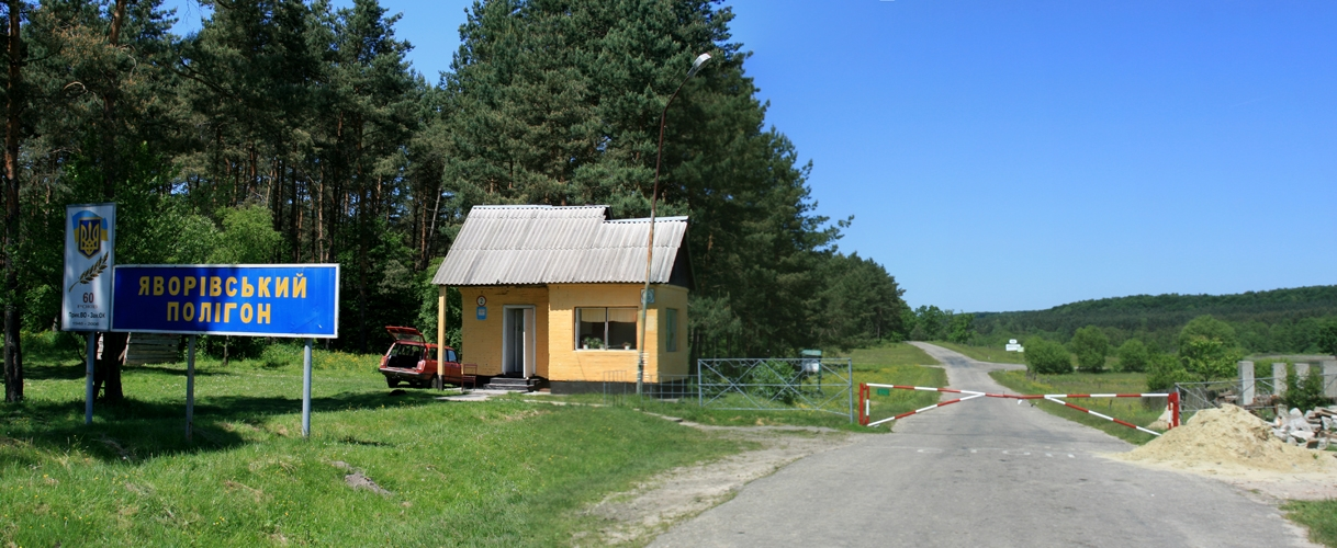 Яворовский военный полигон в Яворовском районе Львовской области, КПП